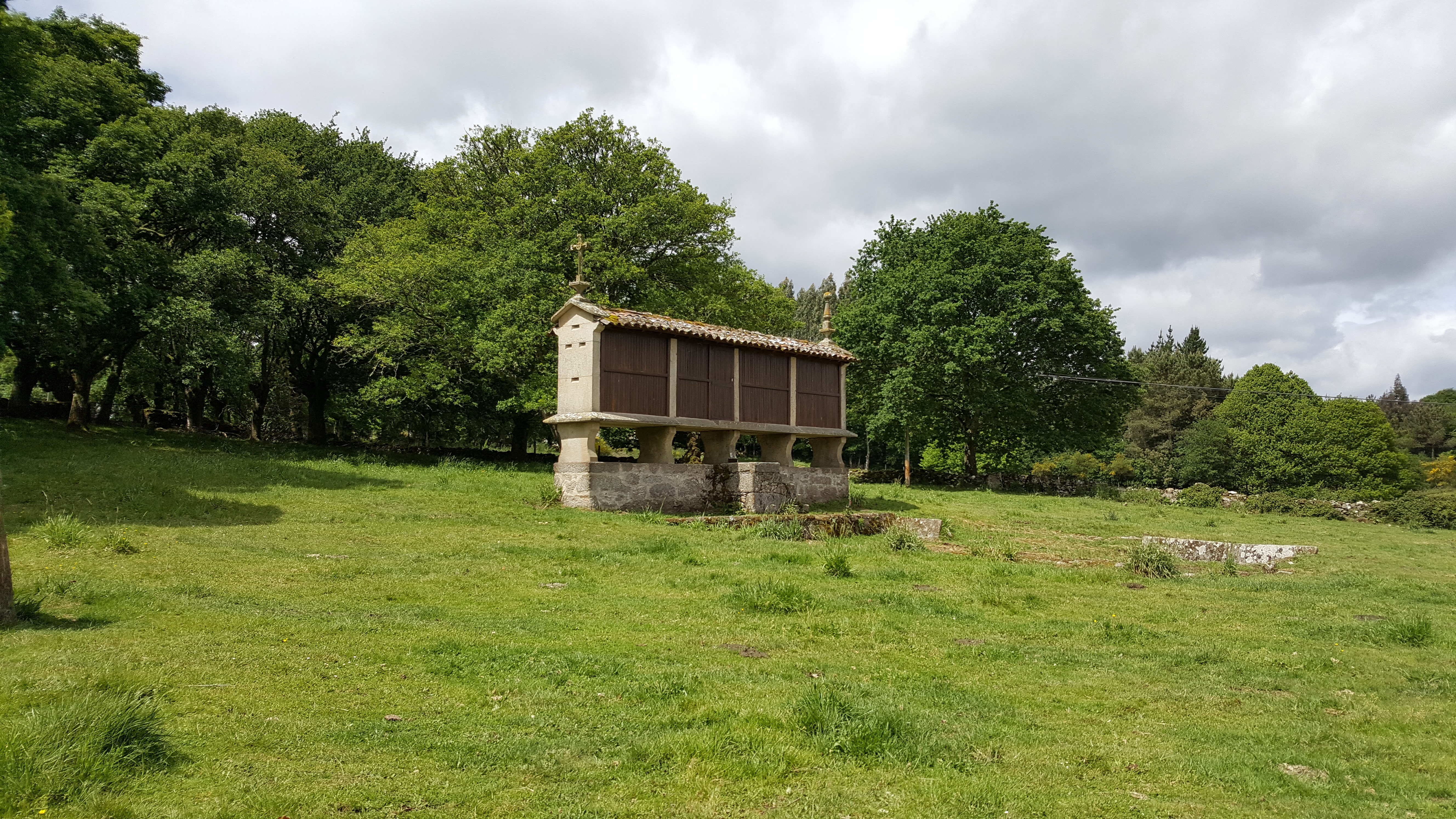 Hórreo en Vilapoupre (Antas de Ulla)